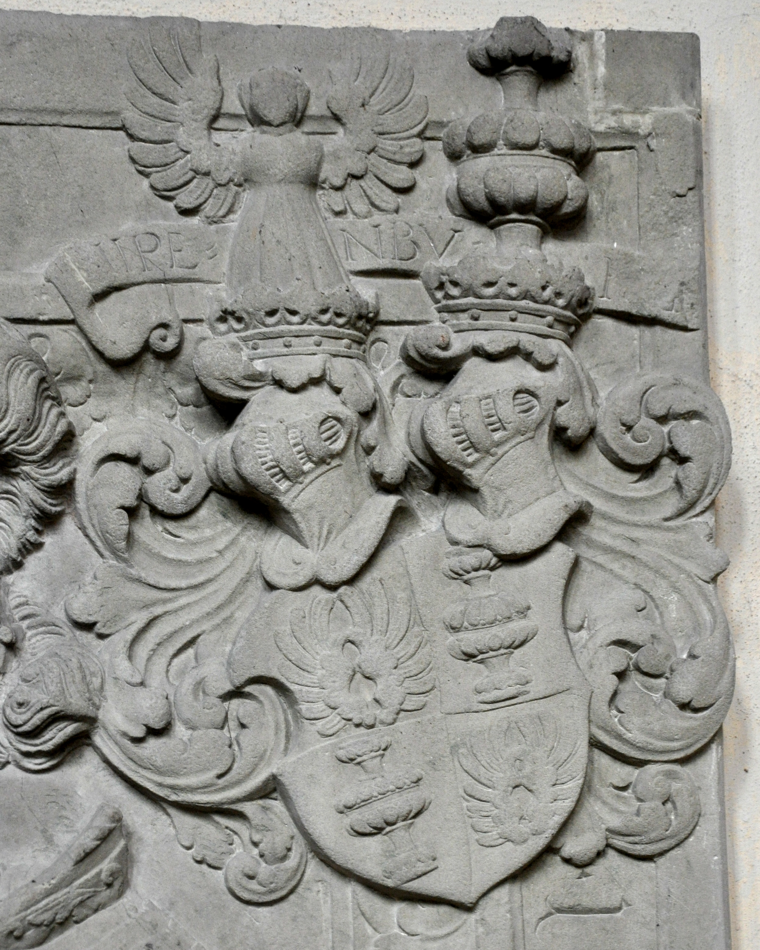 Bad Urach, Stiftskirche St. Amandus, Grabdenkmal des Hans Philipp Nothaft von Hohenberg († 12. August 1549), dem Bildhauer Joseph Schmid zugeschrieben; Detail: Ahnenwappen von Nippenburg (Mutter des Verstorbenen)